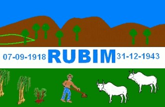 Bandeira do município de Rubim, MG, Brasil.